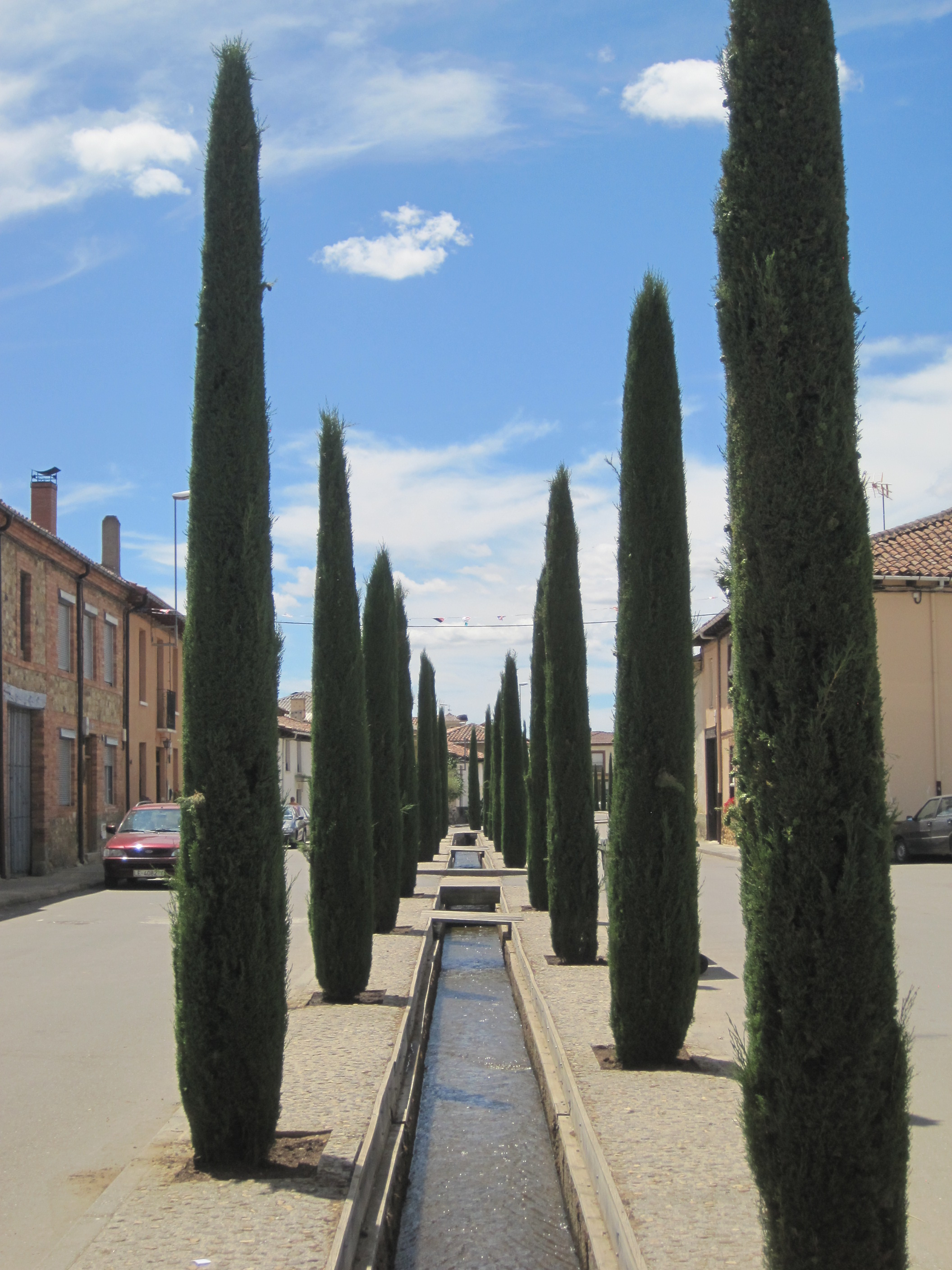 Canal en la calle principal de Cerezales del Condado (León, España).